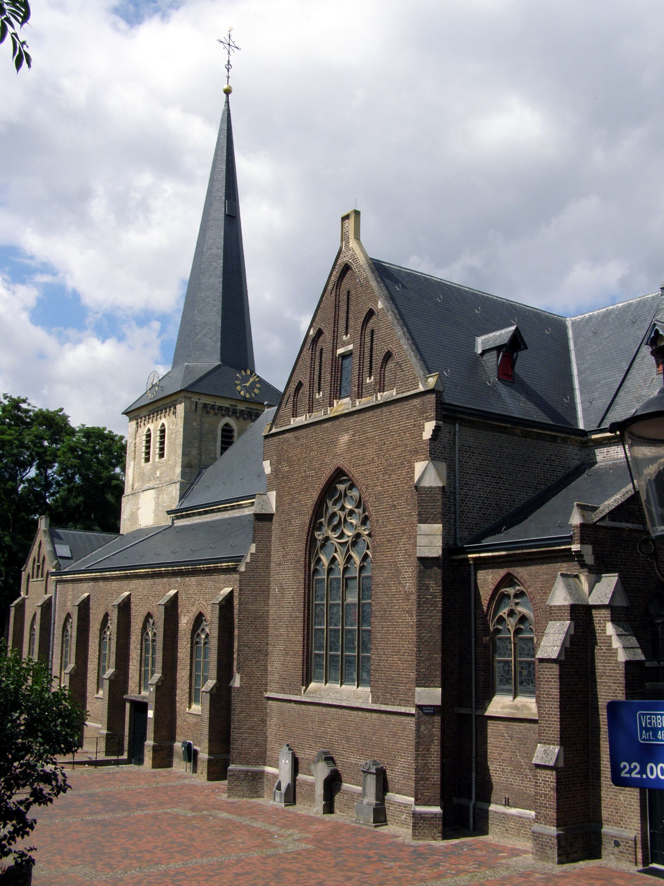 De Sint-Martinuskerk is een kerkgebouw in het Nederlandse dorp Stein. De huidige kerk werd in neogotische stijl ontworpen door architect Johannes Kayser en gebouwd in 1884. Deze afbeelding is van na de restauratie.